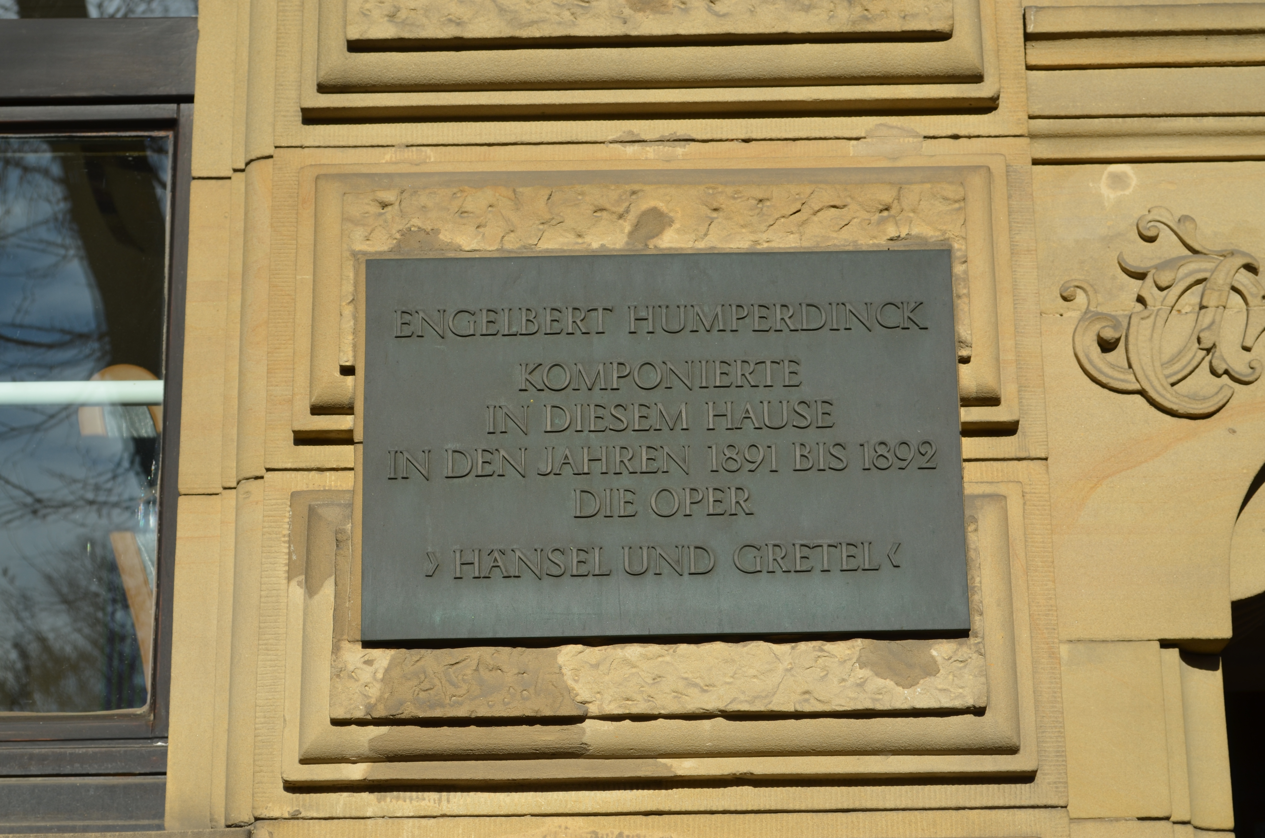 Frankfurt, Scheffeleck